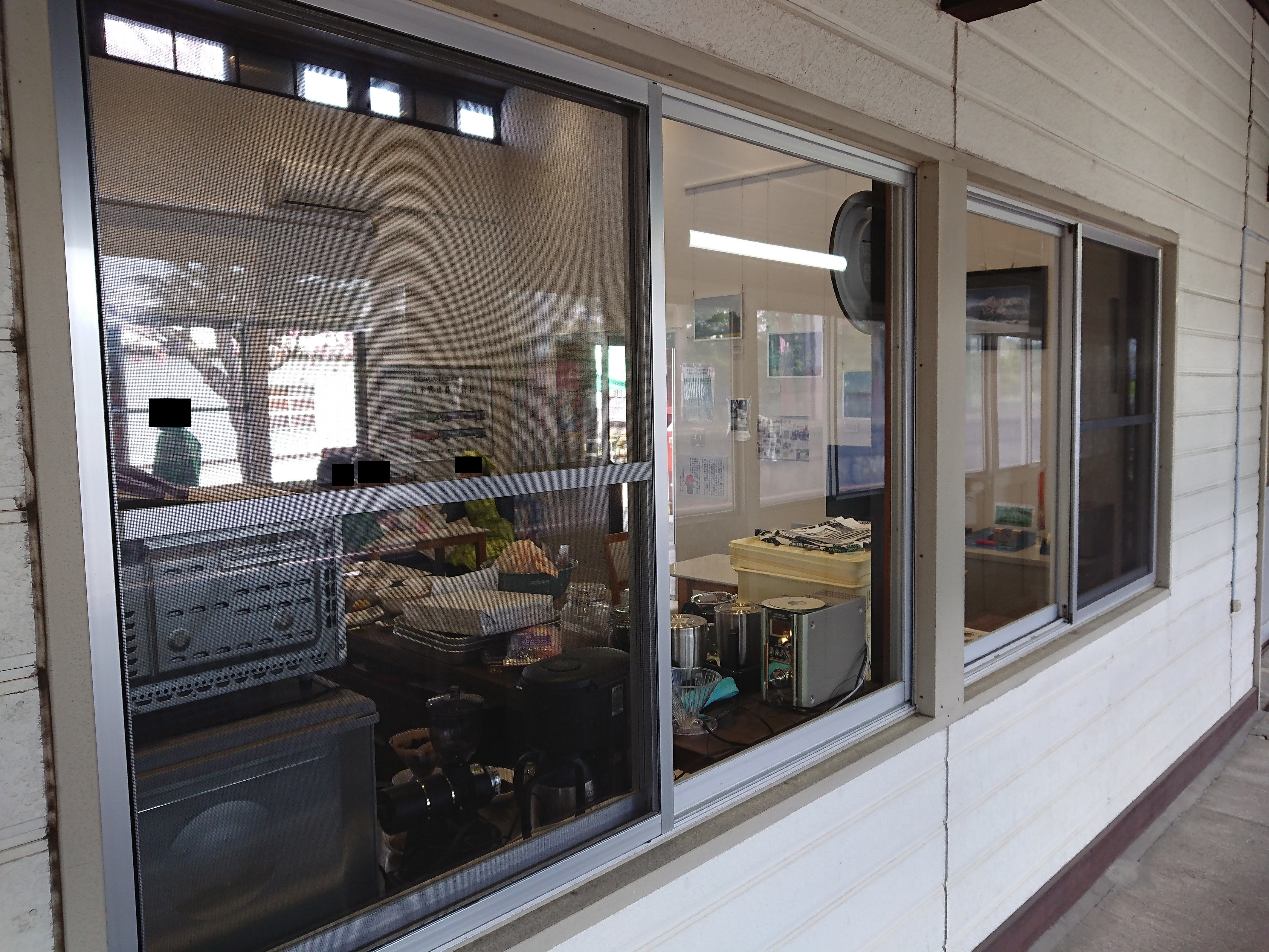 二本木駅の「さとまルーム」